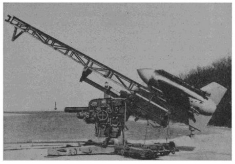 Missile Enzian sur sa rampe de lancement cruciforme